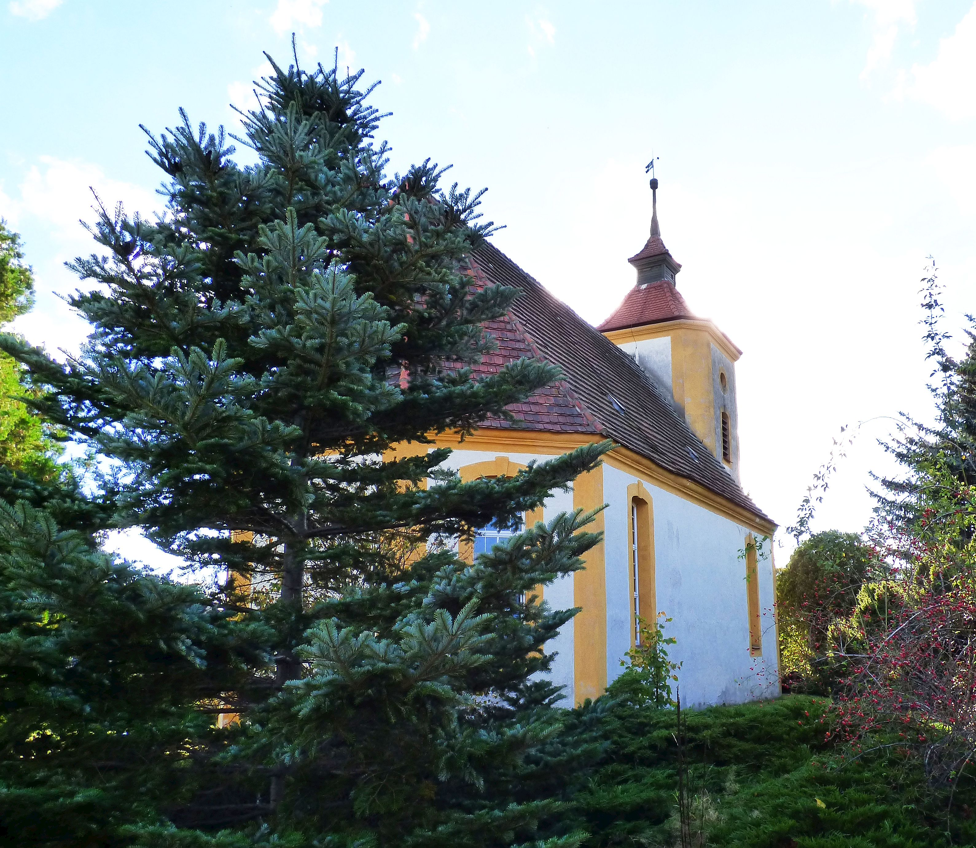 Dorfkirche Dreska